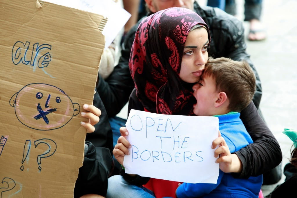 Flüchtlinge am Budapester Ostbahnhof